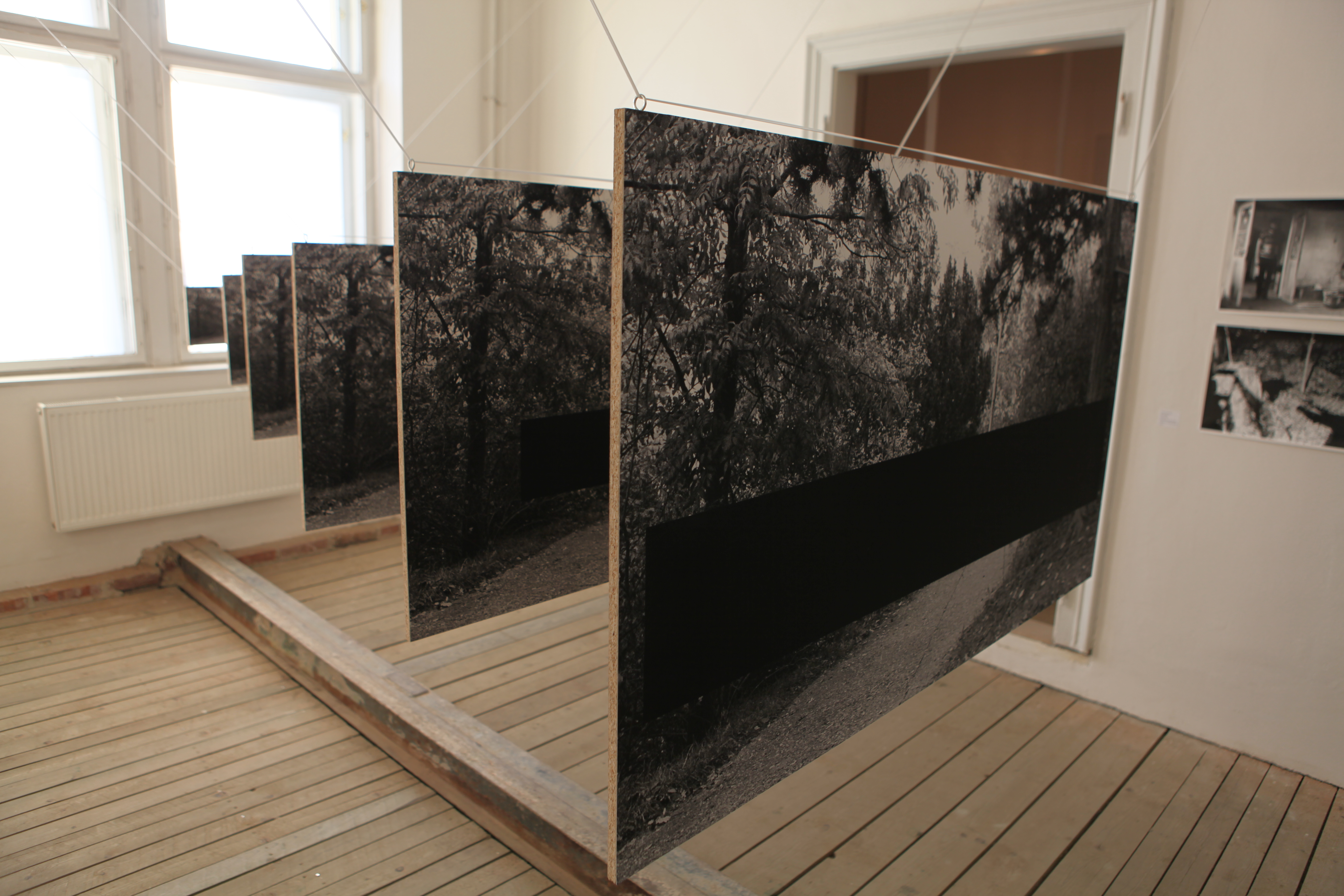 Expozice festivalu Prague Photo 2013, foto: Vít Švajcr Dobré světlo.com. FAMU